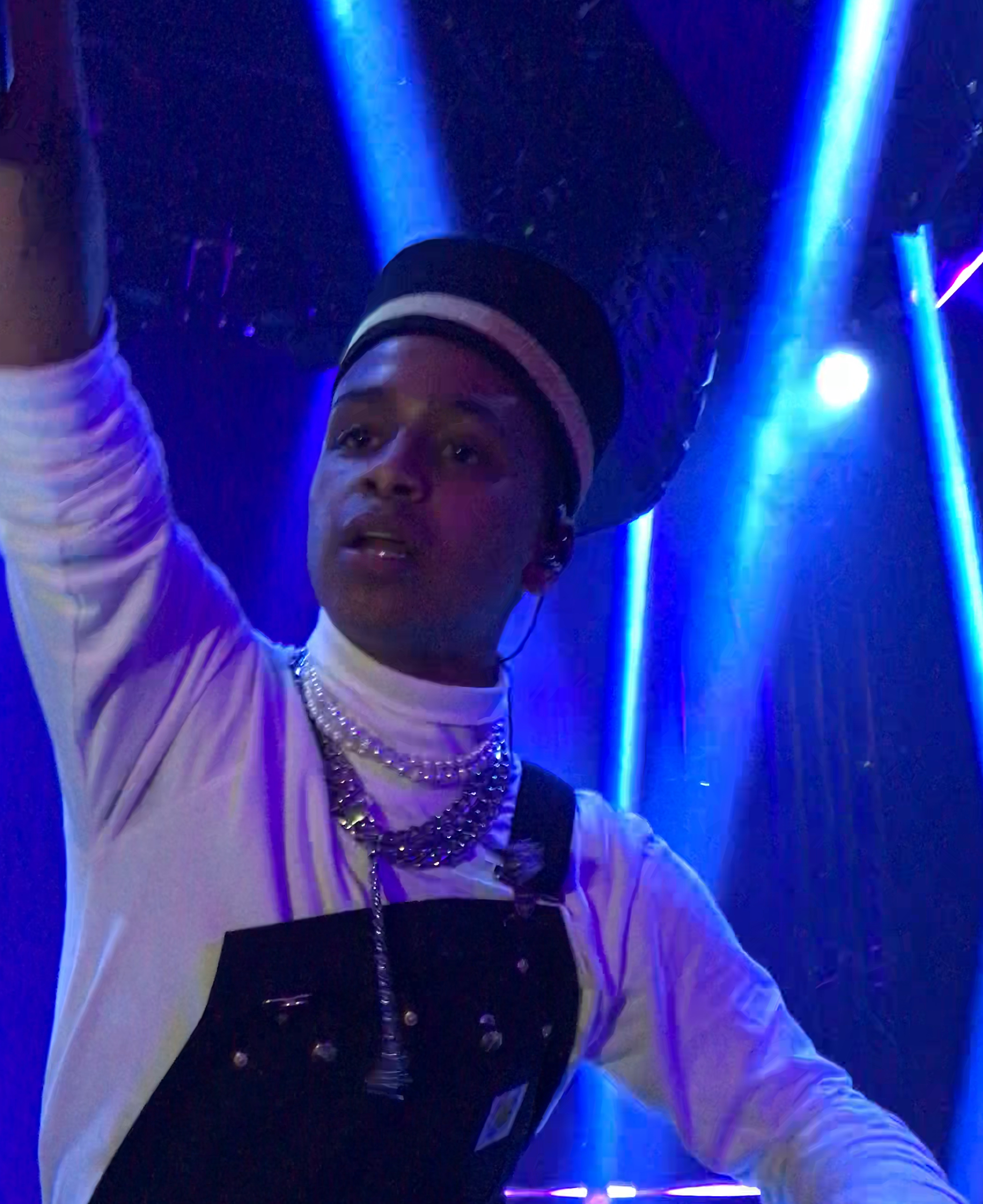 Karpe live in Hamar kulturhus (2019)